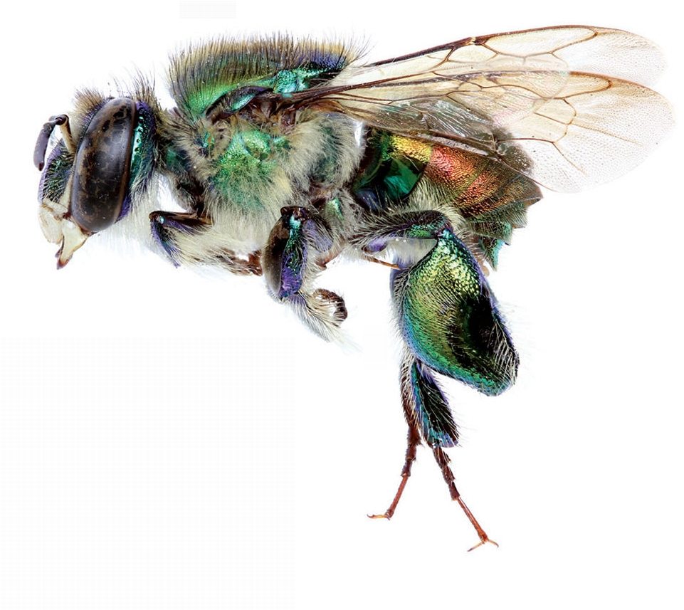 Euglossa villosa male